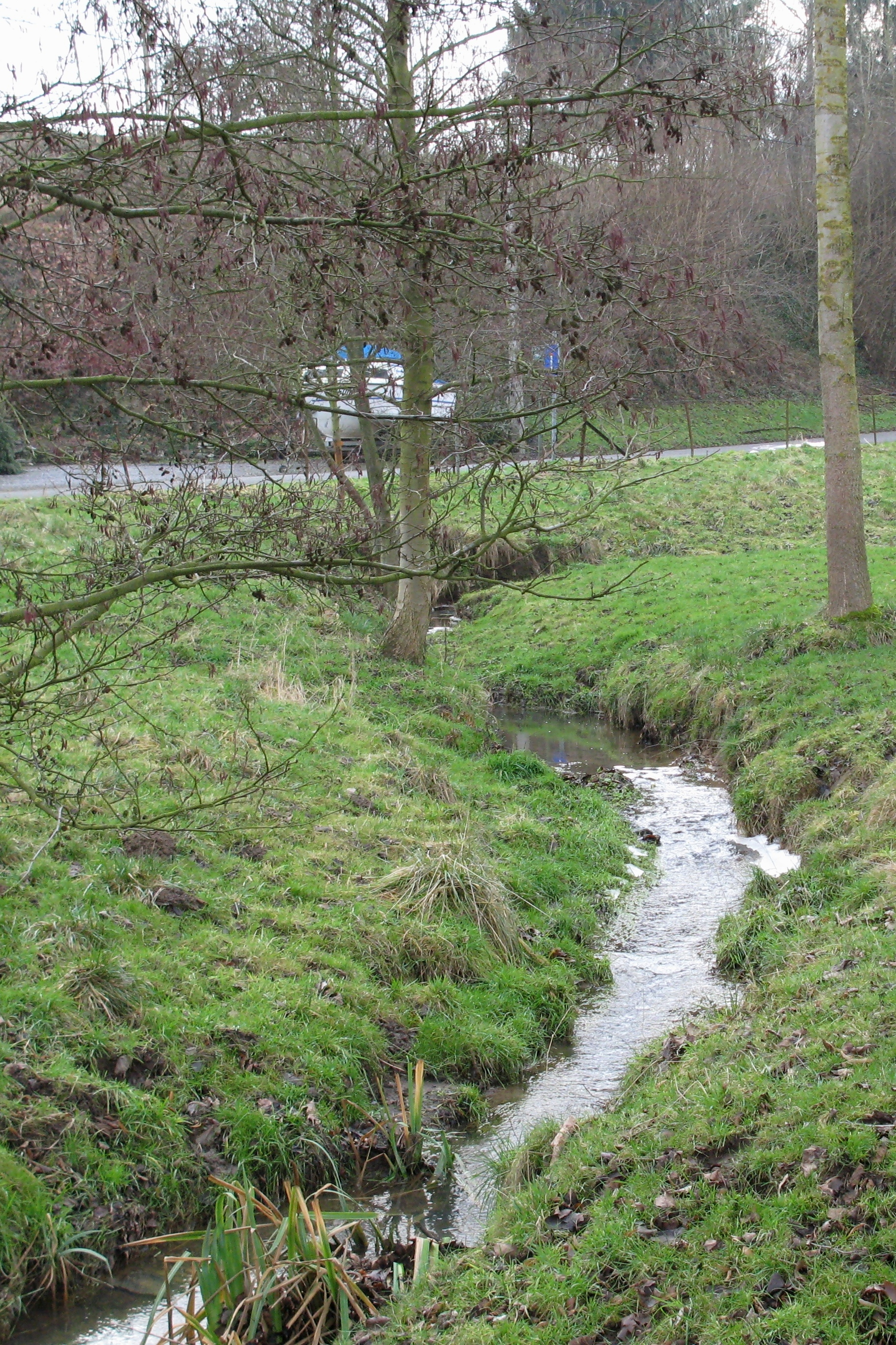 De Ri Jean-Jean, just virum Zesummelaf mat der Burdinale. Ri Jean-Jean Ri Jean-Jean